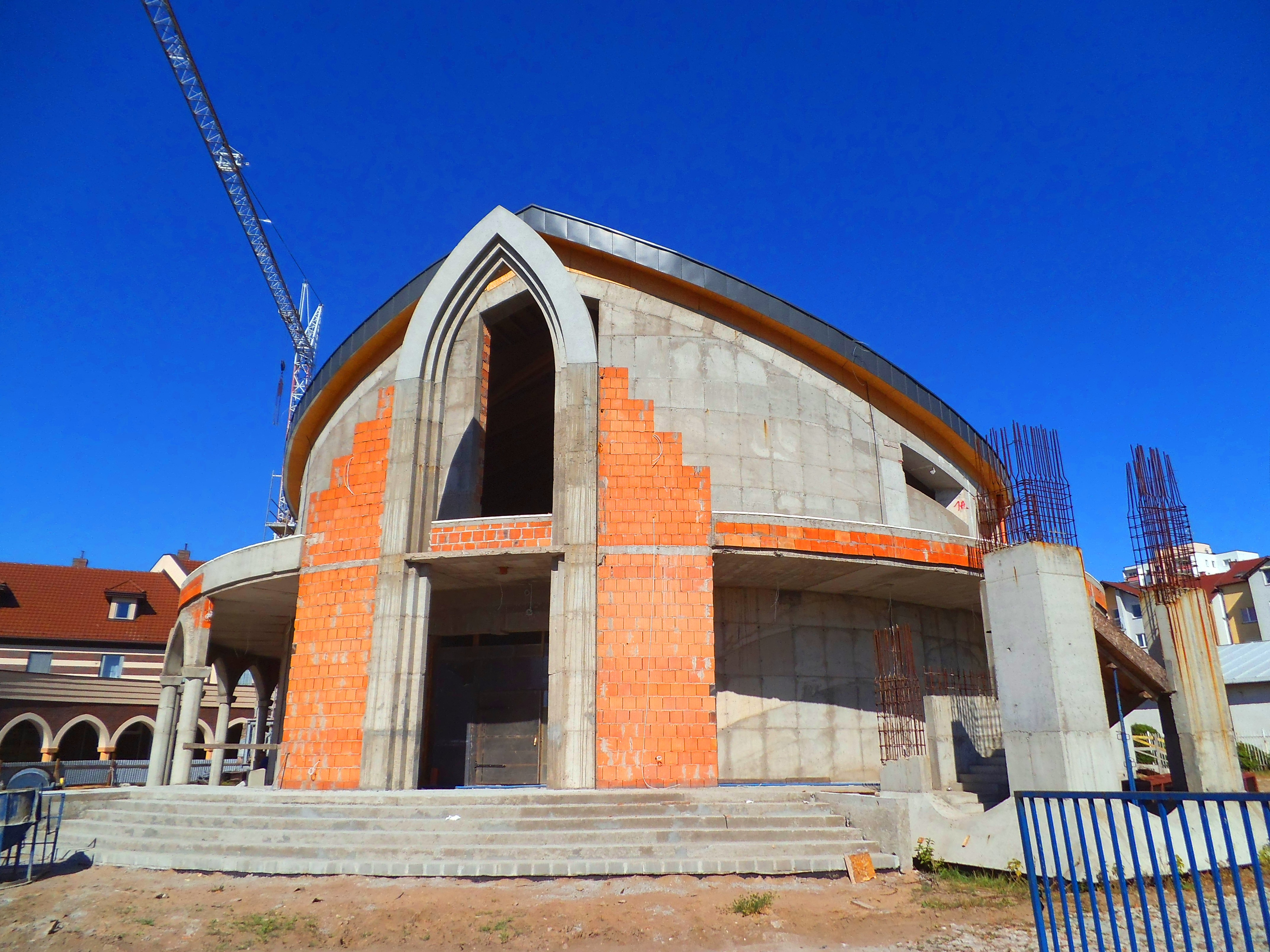 Budowa1 kościoła Najświętszej Maryi Panny Częstochowskiej w Toruniu2016